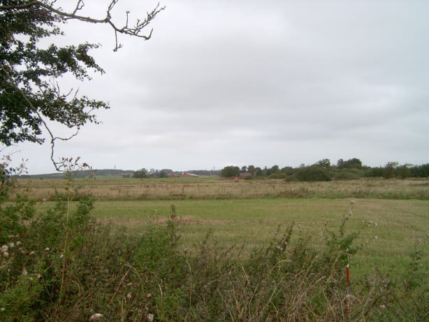 Udsigt over Sall Hede i Østjylland.